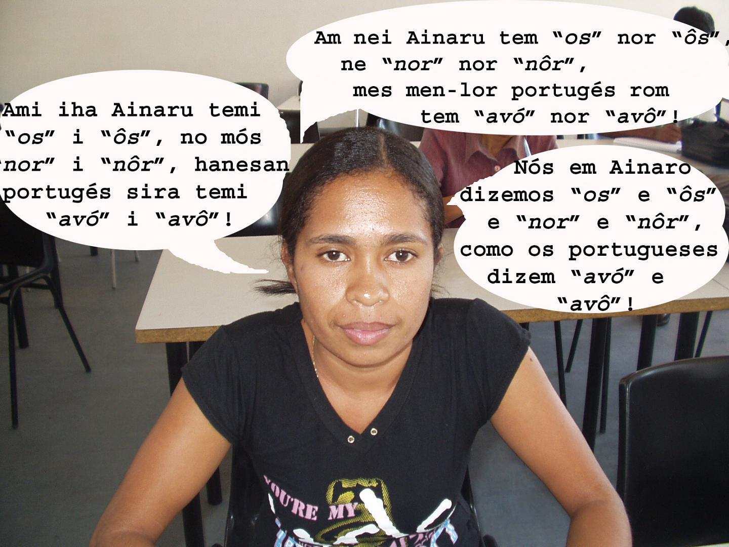 Photo & editing both by João Paulo T. Esperança. This photo was used as ilustration in a Portuguese language course in Tetum, whose lessons used to be published weekly in the East Timorese newspaper Lia Foun. Fotografia e composição da autoria de João Paulo T. Esperança. Esta fotografia foi usada como ilustração num curso de língua portuguesa em tétum cujas lições eram publicadas no jornal timorense Lia Foun. Person portraited / Pessoa retratada: Lucrécia Guterres de Araújo, an East Timorese girl (uma moça timorense), speaking (left to right) Tetum, Mambai and Portuguese.